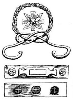 ציור אבני בזלת מעוטרות מח'ספין מספרו של לורנס אוליפנט הציורים צוירו על ידו בעת ביקורו בח'ספין ב-1885